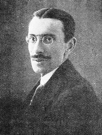 Javier Valcarce García, fotografía en Vida Gallega 1917